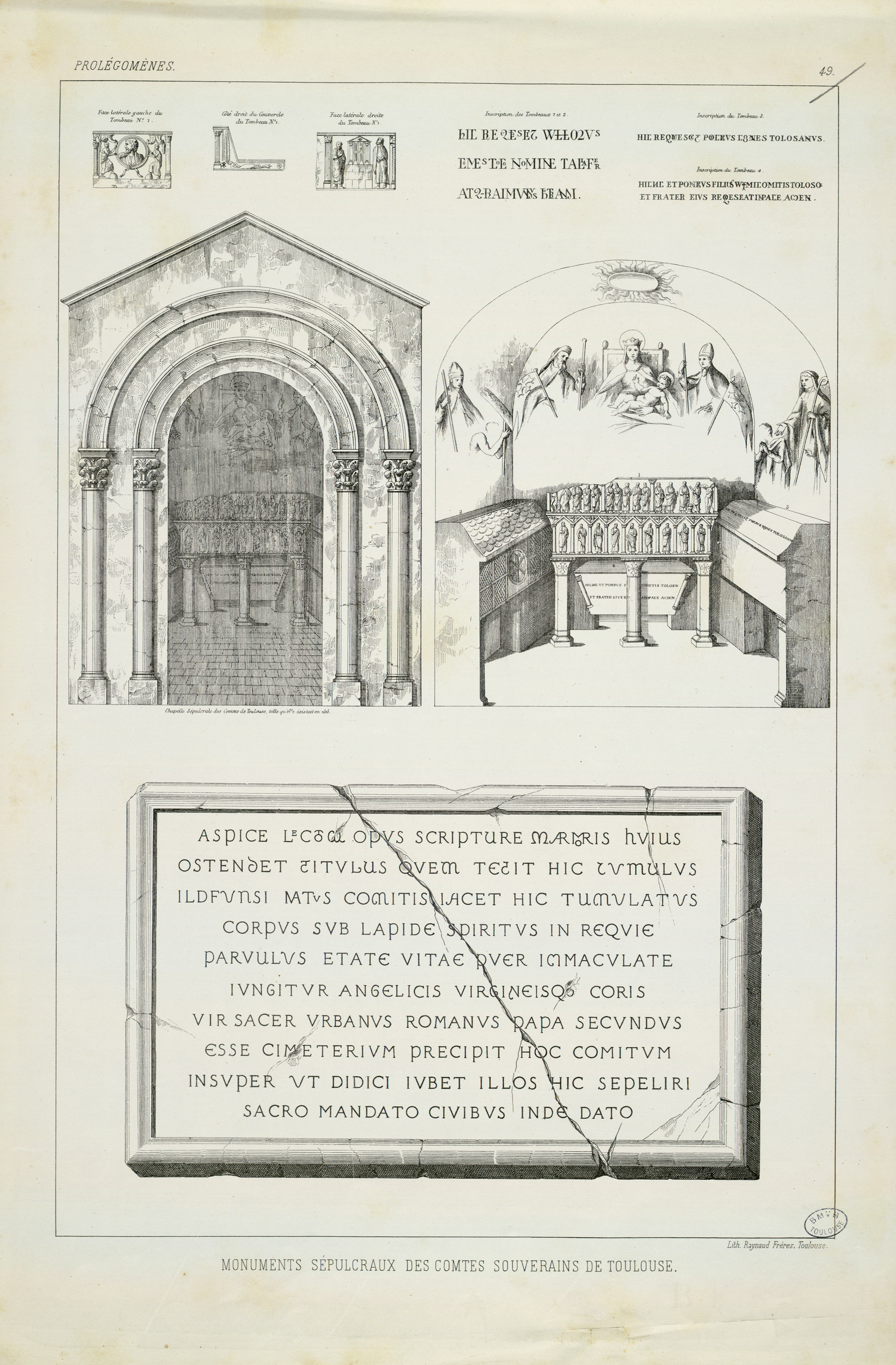 Texte incomplet des dernières pages. La plupart des lithographies ont été tirées par les ateliers de Raynaud frères, d'après A. Du Mège. Quelques unes ont été dessinées et lithographiées par Charles Gall, Bonnet, E. Binet, Durand, M. Pomier, P. Lacour, G. Chariol, Les planches sont numérotées mais plusieurs manquent sur les 49 annoncées (pl. 1, 6, 13, 18, 21,22, 23, 24, 25, 26, 27, 28, 30, 31, 32, 33, 38, 40, ...) : il semblent que ces planches n'aient jamais été publiées (voir note p. 9 du texte). - Les 4 dernières planches sont extraites du tome II de l'Atlas de l'Archéologie Pyrénéenne. Monuments mythologiques (pl. 1 à 6). Pièces jointes : couvertures papier de différentes livraisons Ancely, René (1876 - 1966). Possesseur